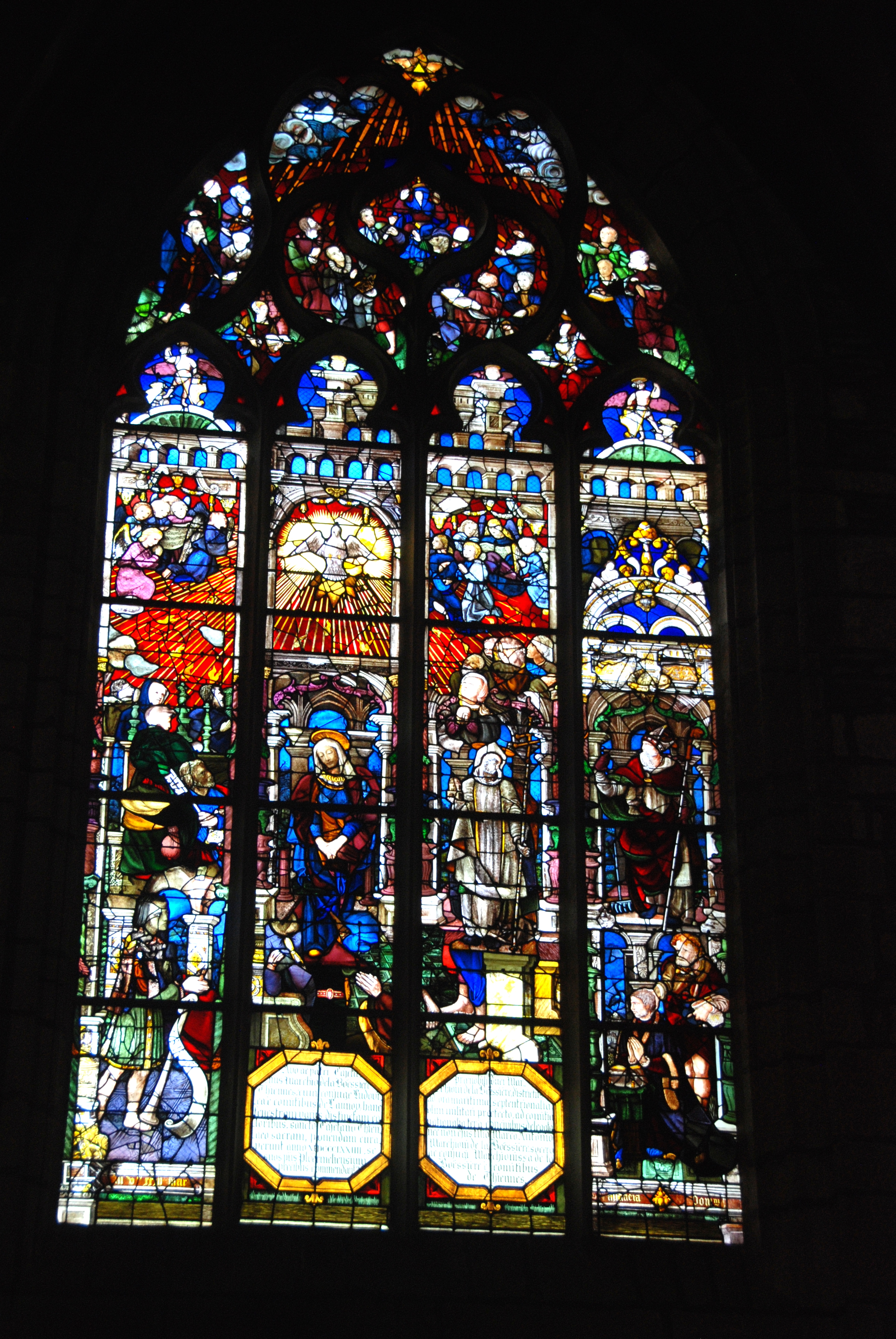 Verrière de la Pentecôte restaurée par Jacques Bony